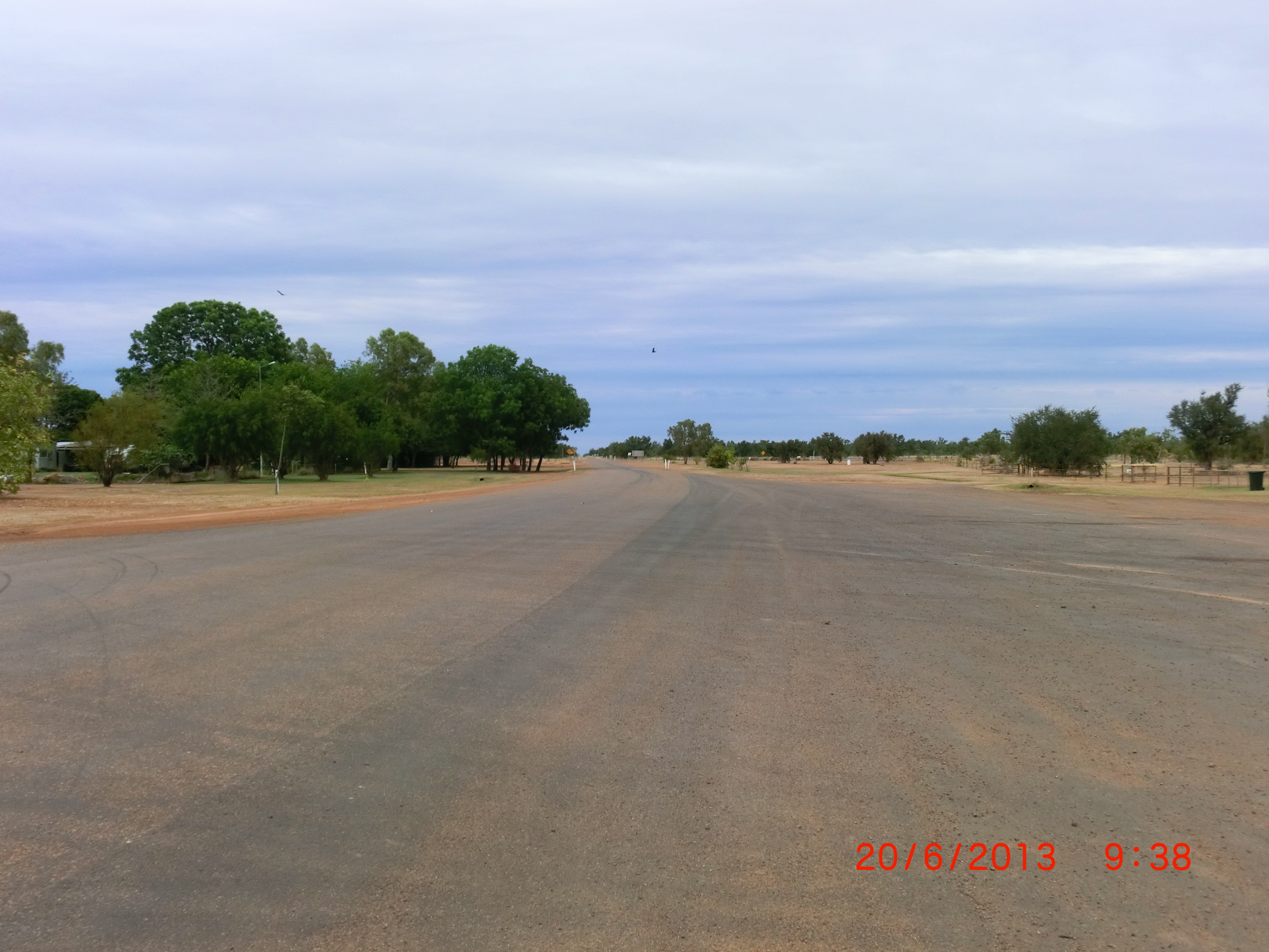 Gregory Downs